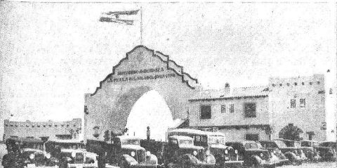 Inauguración del Arco de Mendoza en el cruce de la Ruta Nacional 7 desde la Provincia de San Luis.